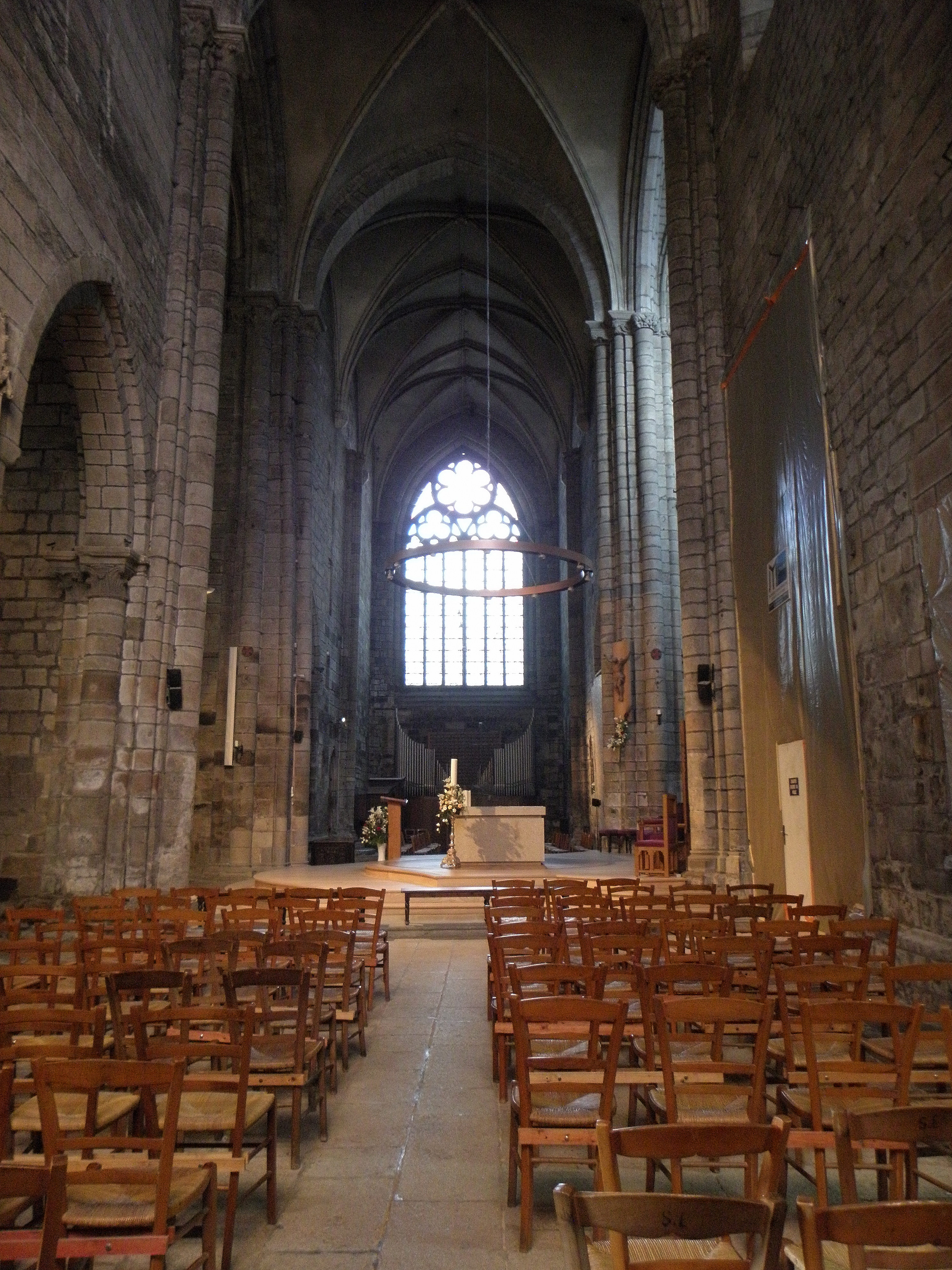 Vue vers le nord du transept de la cathédrale Saint-Étienne de Saint-Brieuc (22).